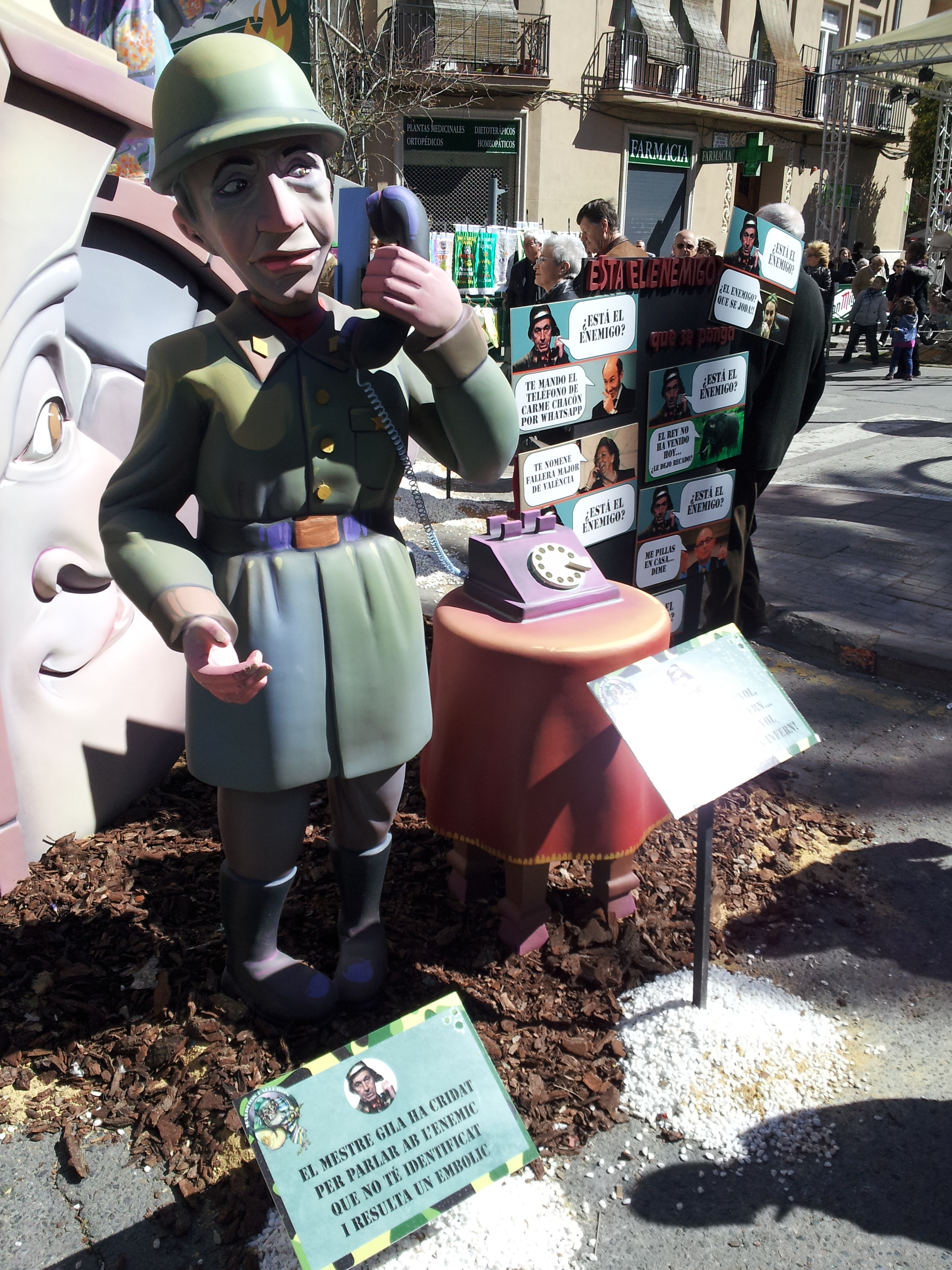 Escultura de Miguel Gila en las fallas de Valencia de 2013